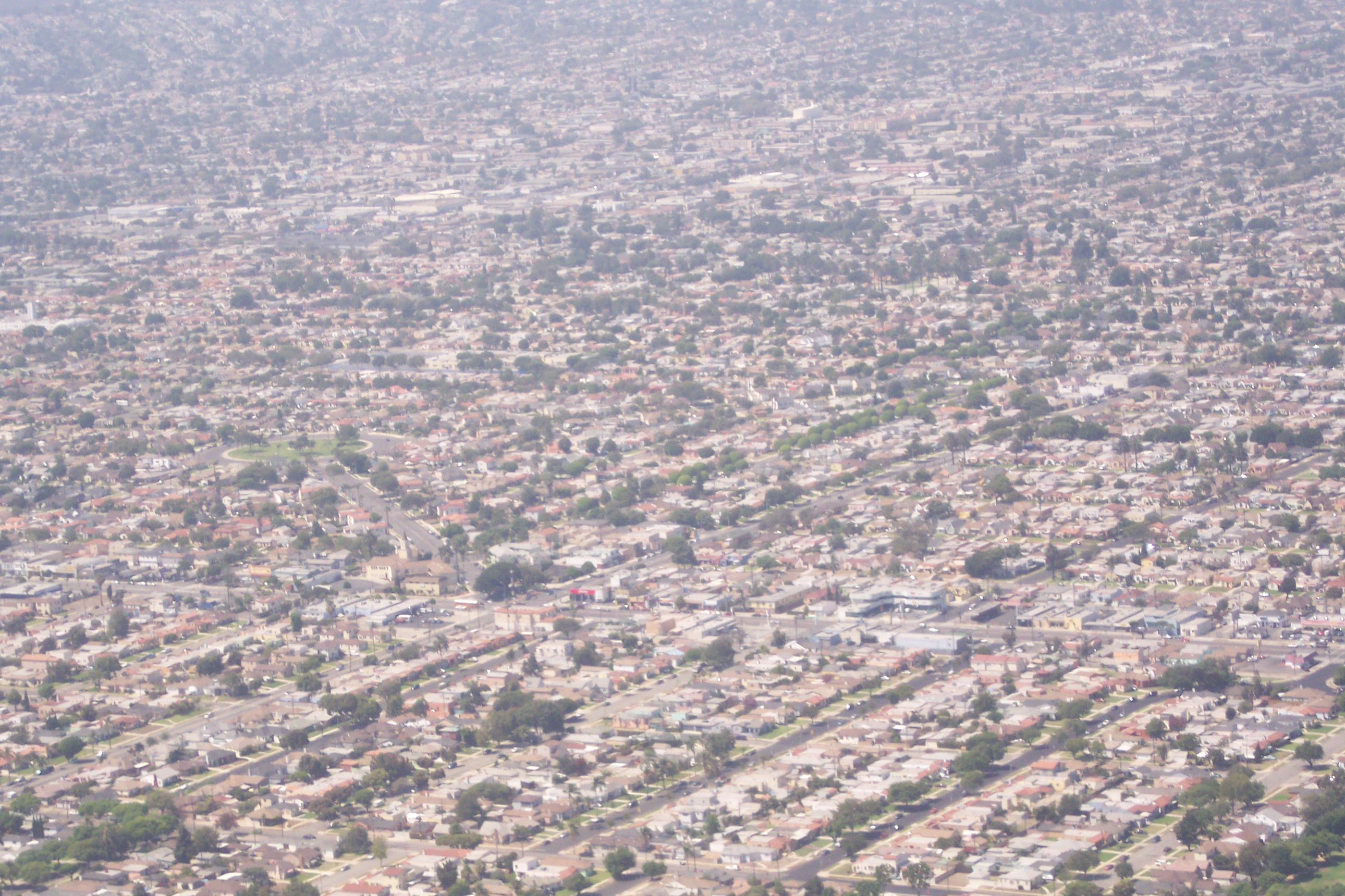 Die Übergangszone von Los Angeles aufgenommen aus einem Flugzeug